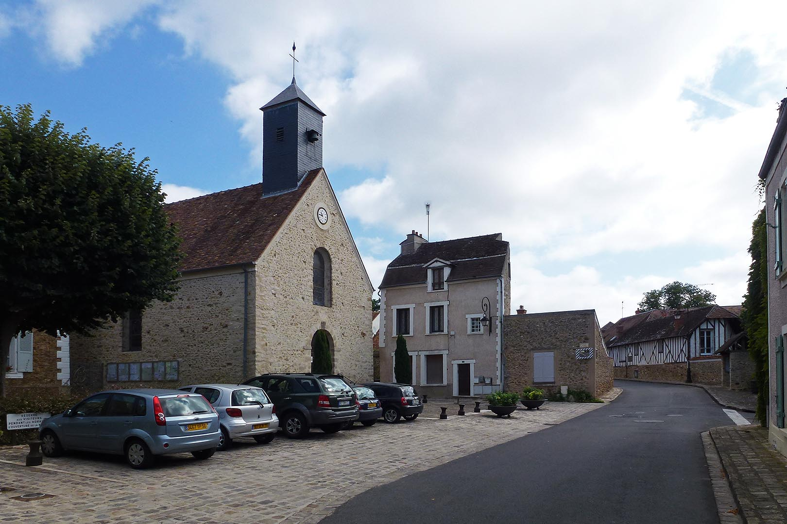 église de la commune de Boissette (77)